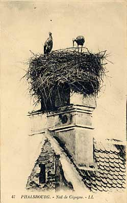 Carte postale ancienne de Phalsbourg (Moselle, France)